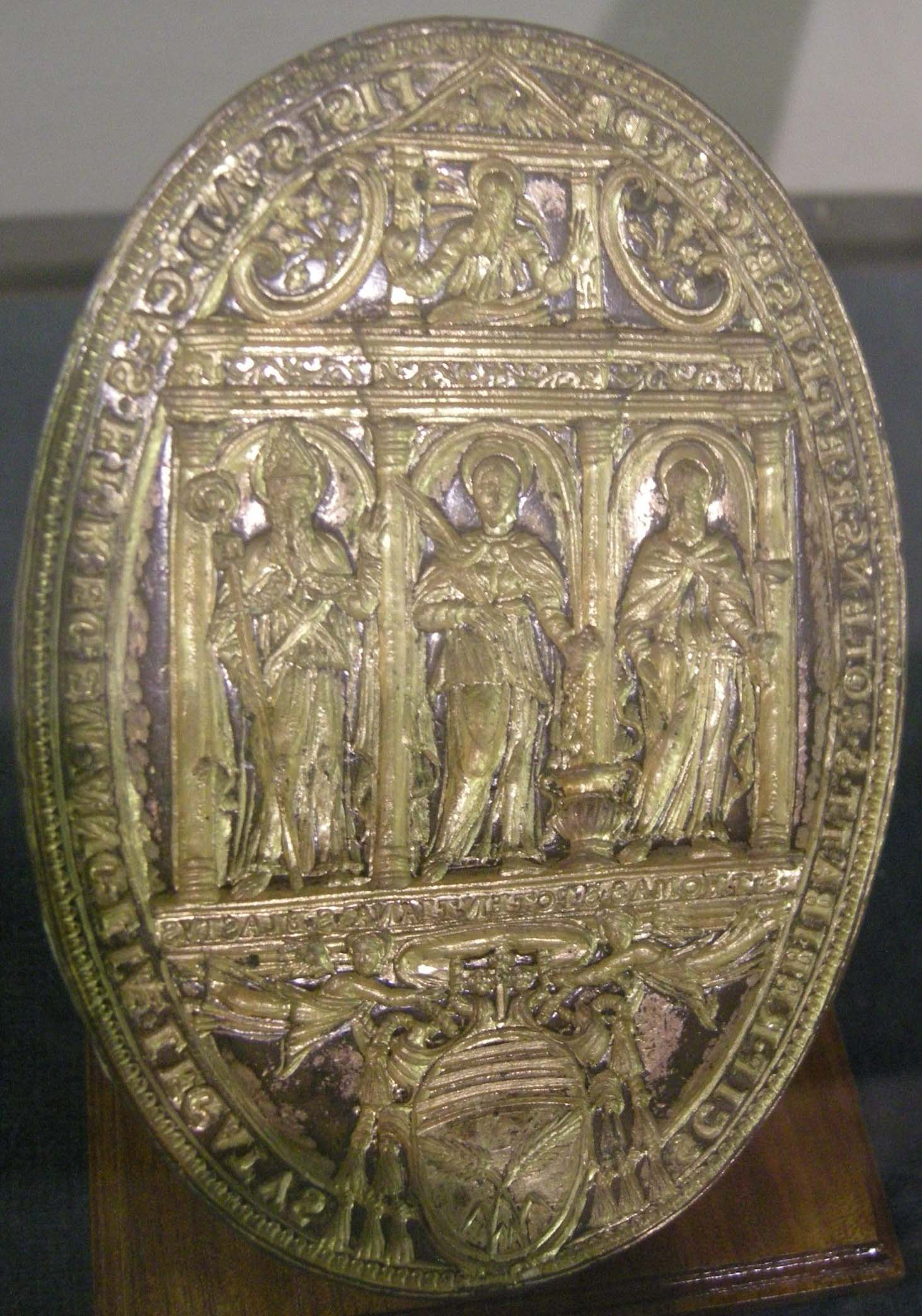 Artista romano, sigillo del cardinale scipione rebibbia, 1556 ca.